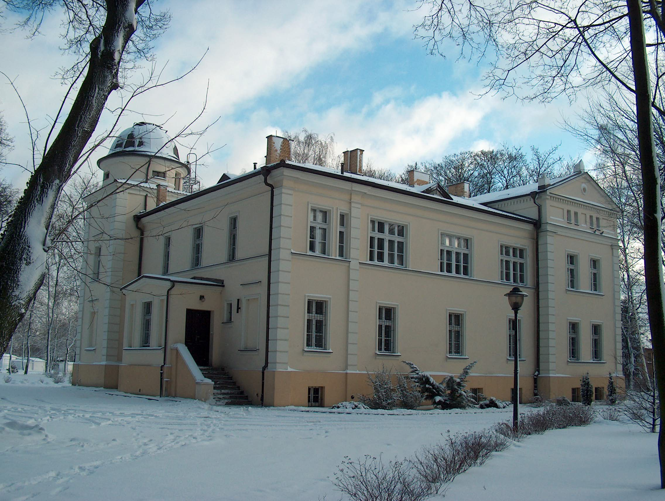 Budynek Obserwatorium Astronomicznego UAM